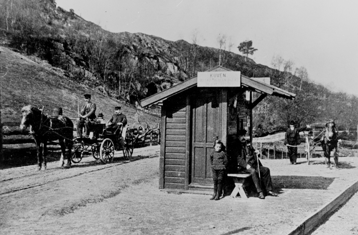 Kuven holdeplass